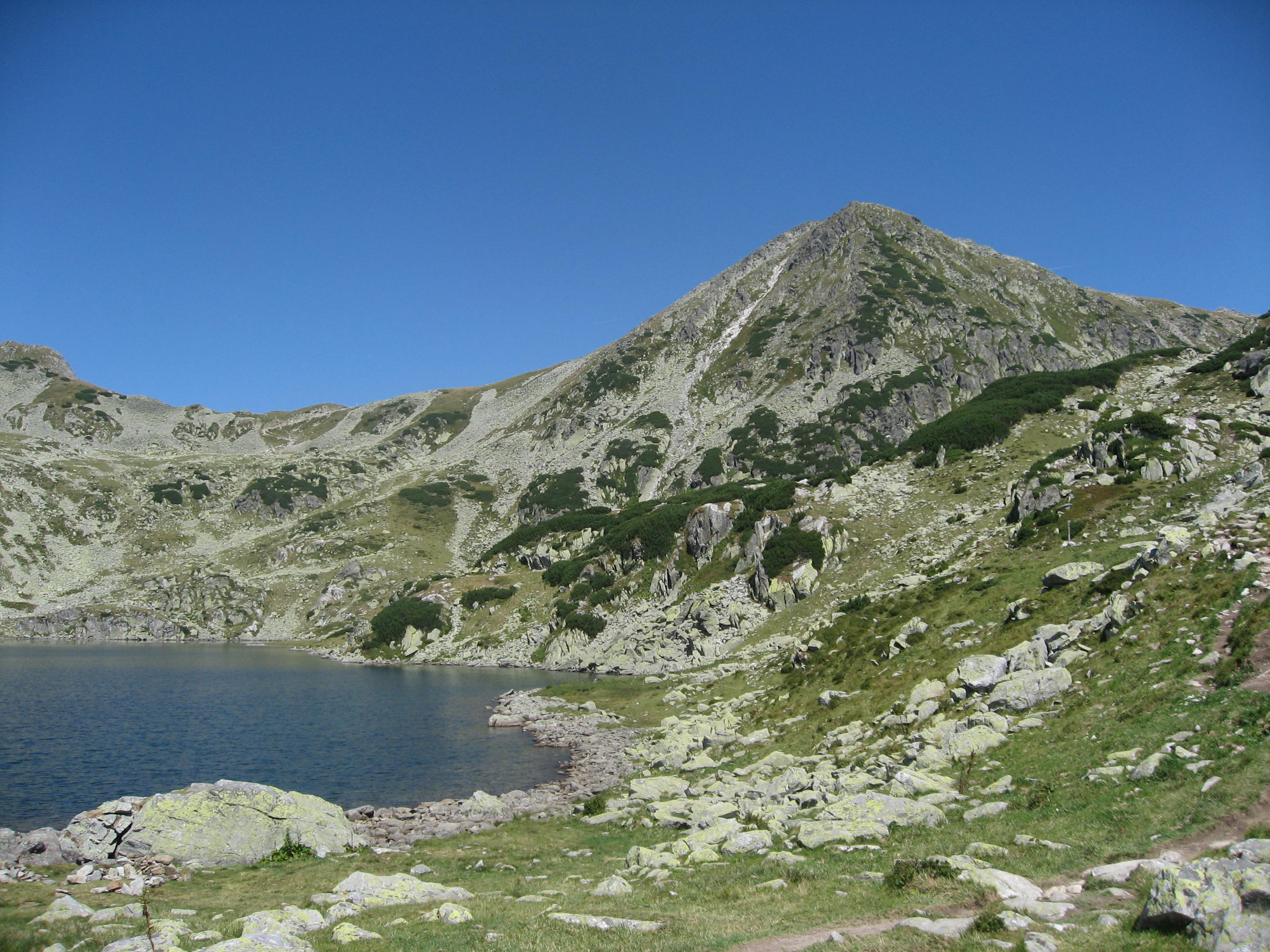 Jezero Bucura a Custura Bucurei